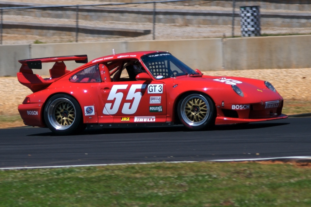 Danny Stewart 1996 Porsche 993 Carrera RSR No. 55 Mitty Challenge 2007Mitty Challenge 07